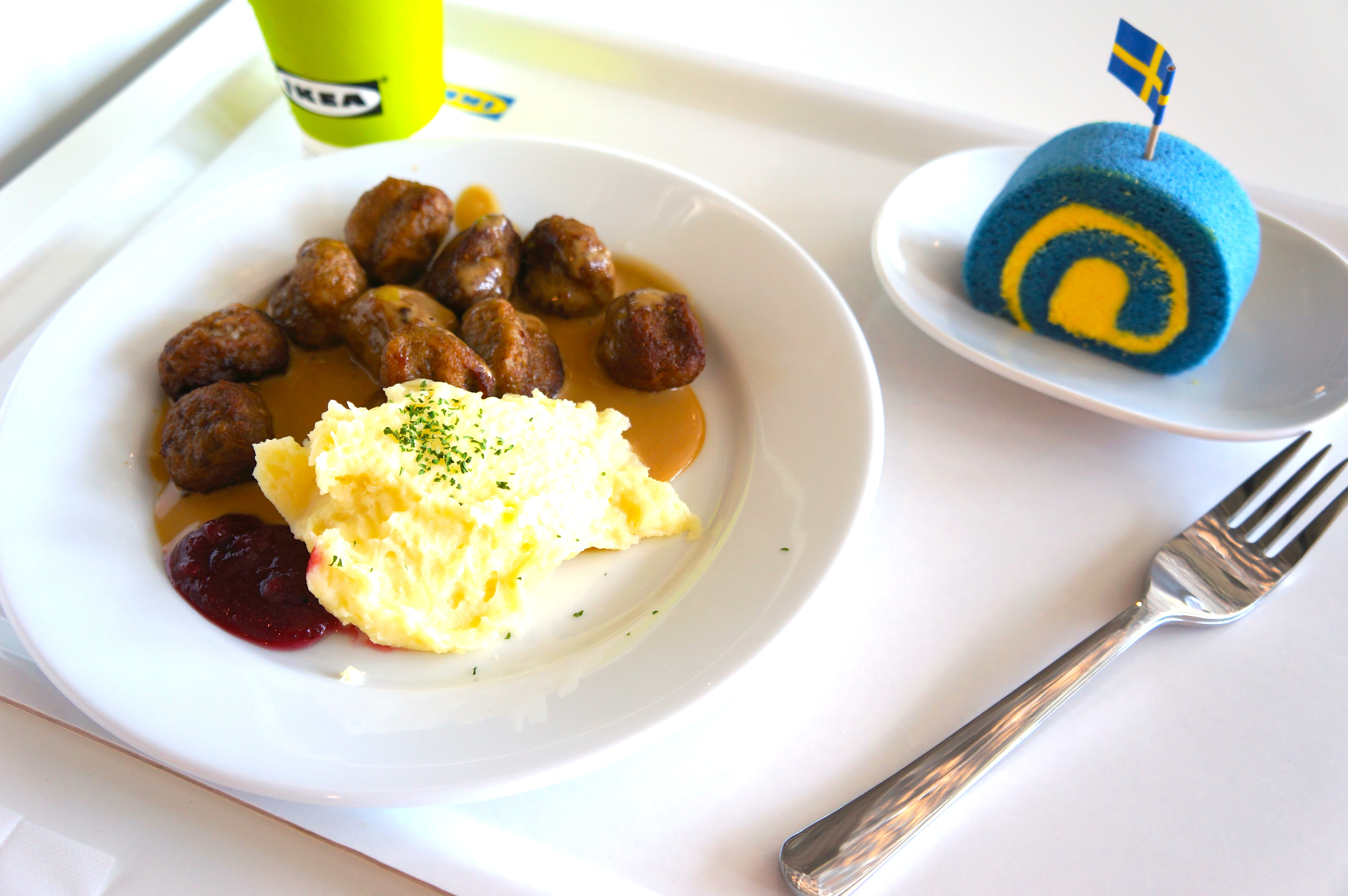 IKEA仙台 レストラン